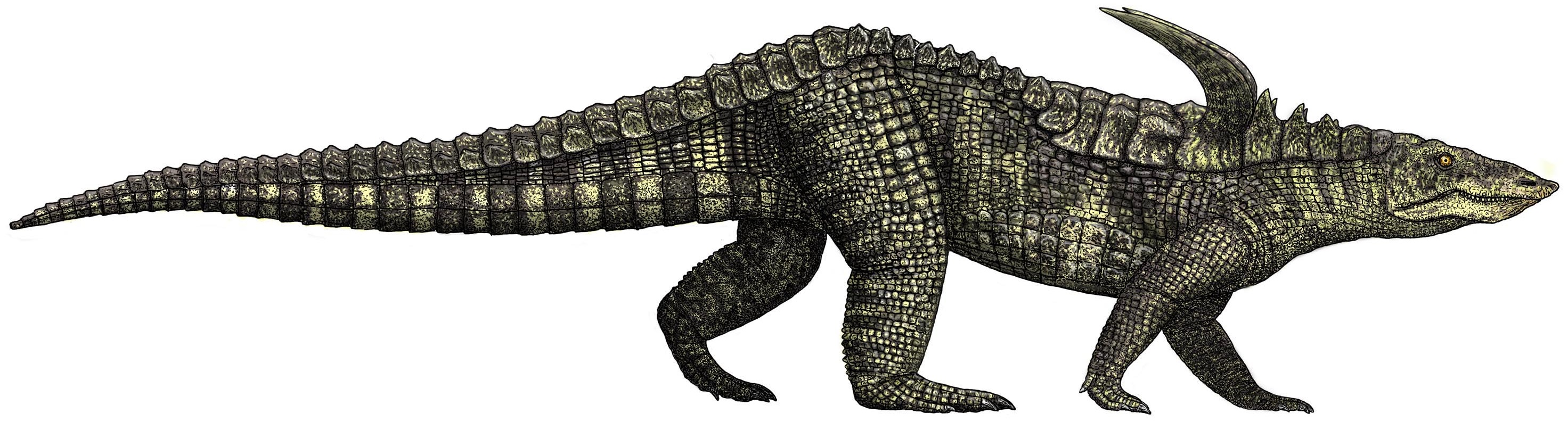 Credit Dr. Jeff Martz/NPS